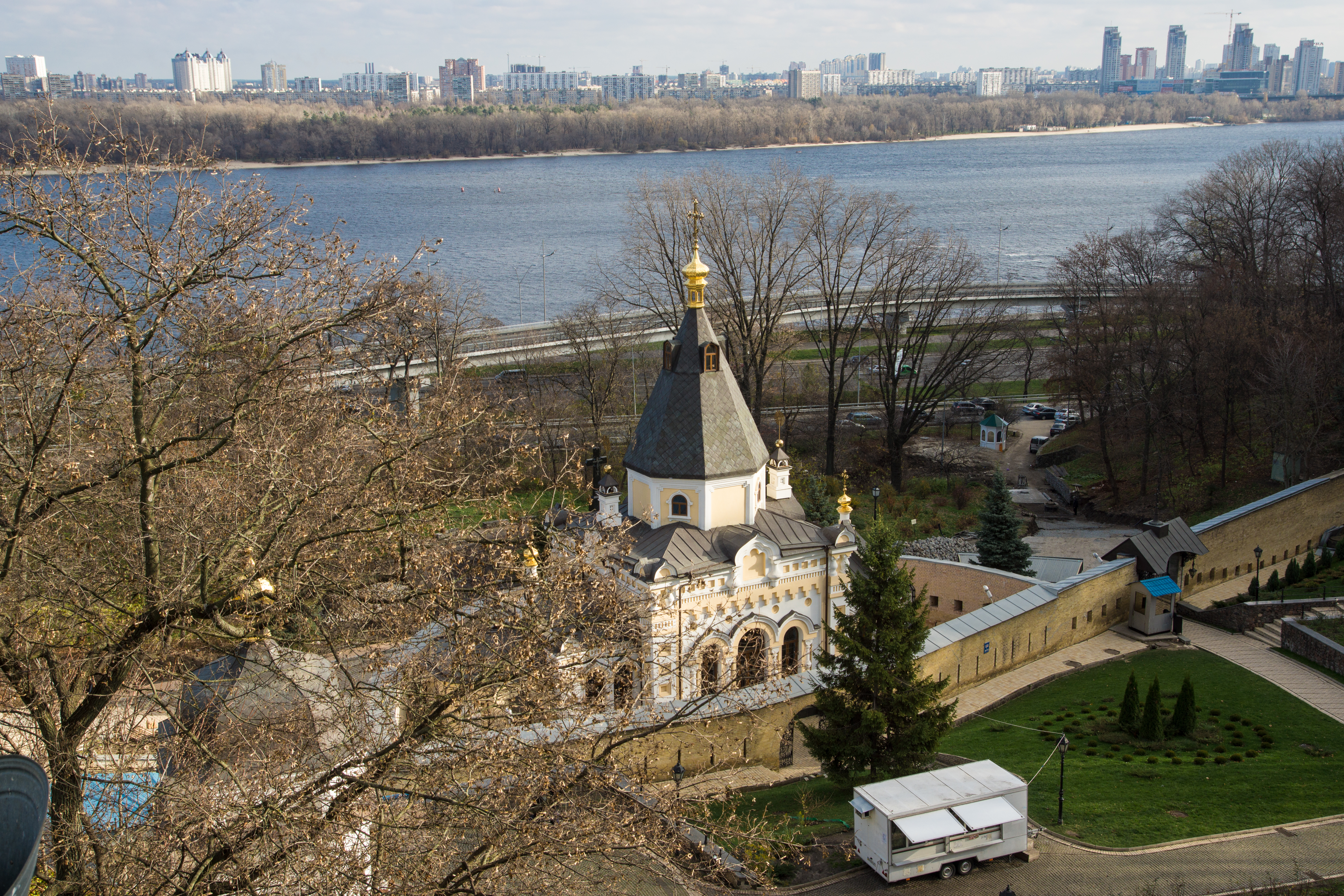 Комплекс Києво-Печерської лаври (Національний заповідник Києво-Печерська Лавра), Київ, Лаврська вул., 9, 15